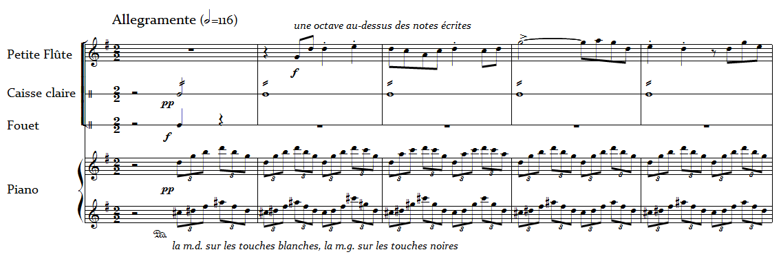 Maurice Ravel, Concerto en Sol, premières mesures